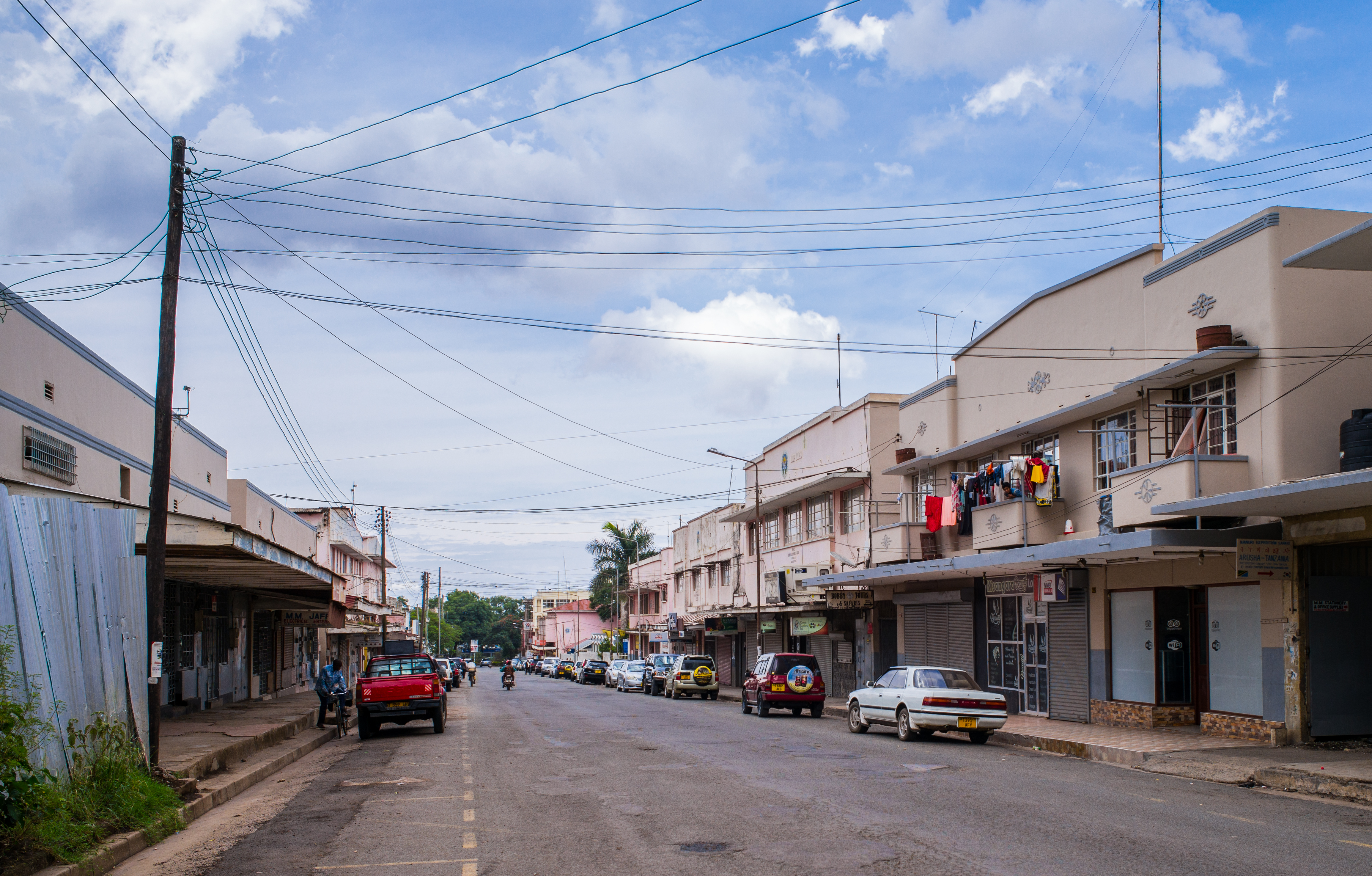 Arusha, Tanzania (Explored)